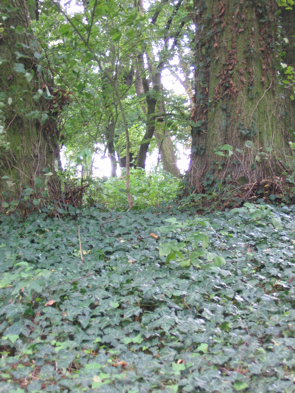 Dno parku wyścielone bluszczem, Młodojewo (foto. Marcin Majdecki)